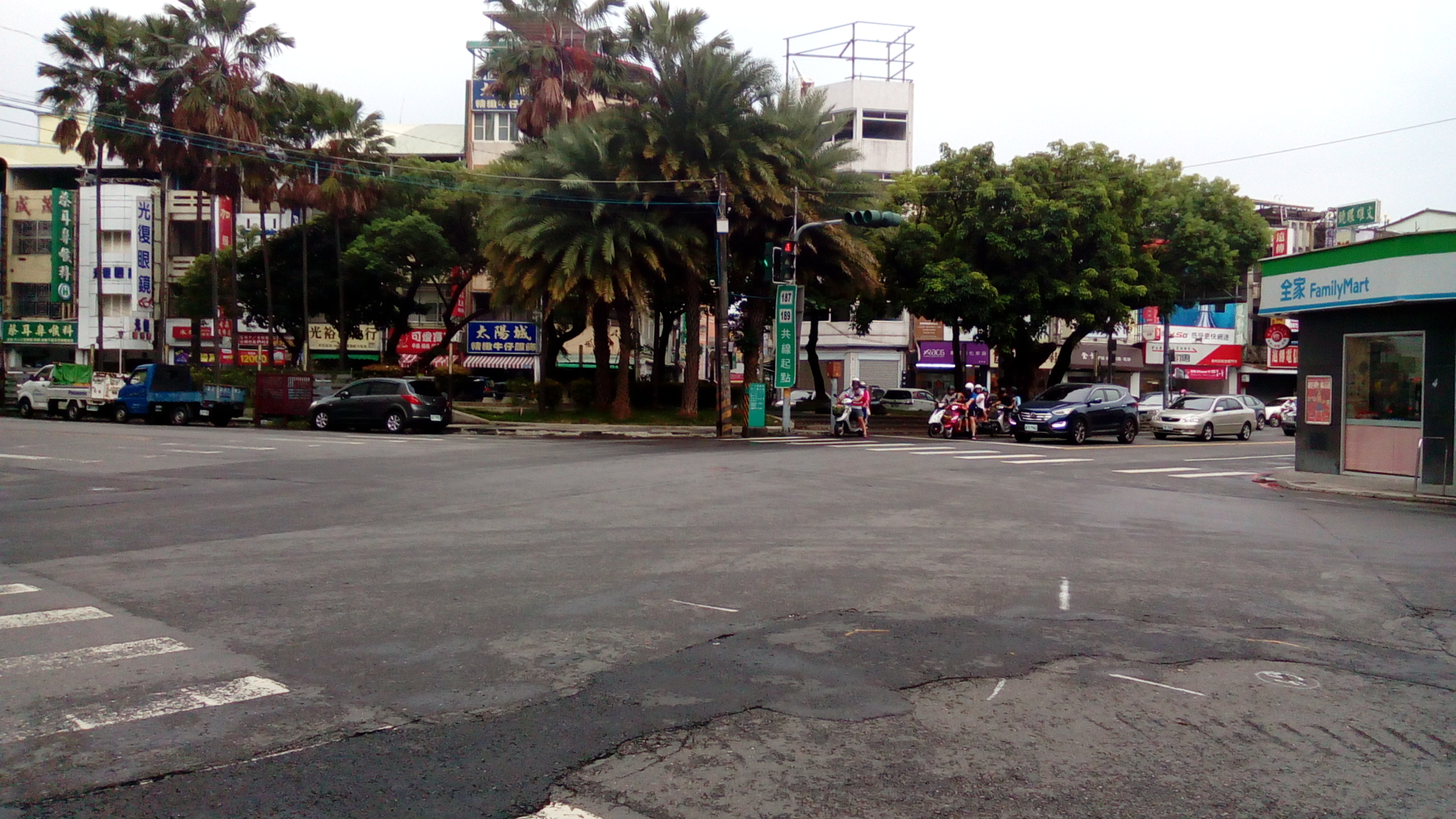 在火車站前200公尺處 新生路和中山路口